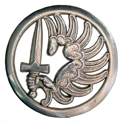 Insigne de béret des parachutistes métropolitains et légionnaires français appelé DEXTROCHERE (Emplumé serrant un glaive), : Animal symbolique qui orne l’insigne de béret des unités parachutistes métropolitaines.